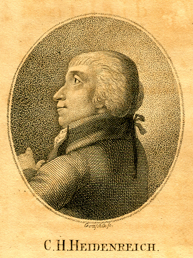 Karl Heinrich Heydenreich (1764-1801). Porträtstich von Gottschick, vor 1816.